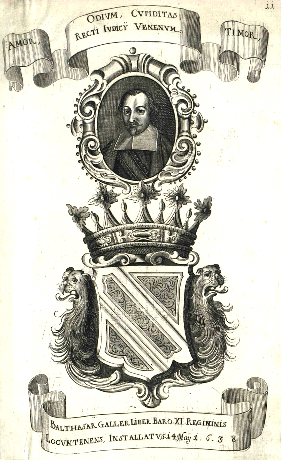 Portrait des Freiherrn Balthasar Galler von Schwanberg, * um 1585 Schwanberg in der Steiermark, † 25. August 1638 Graz, Statthalter von Innerösterreich, ab 1631 Kämmerer bei Kaiser Ferdinand II., mit seinem Familienwappen